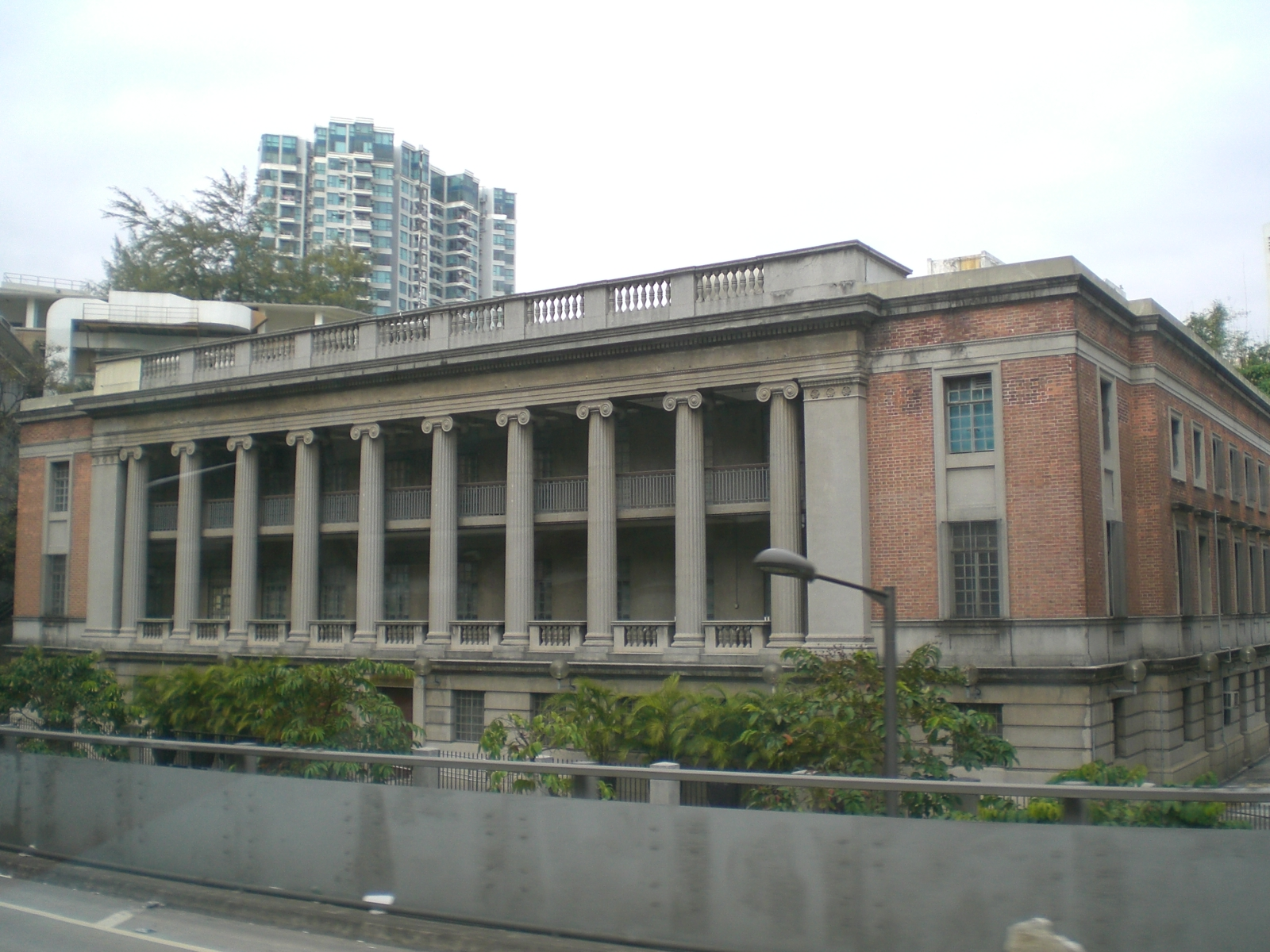 加士居道